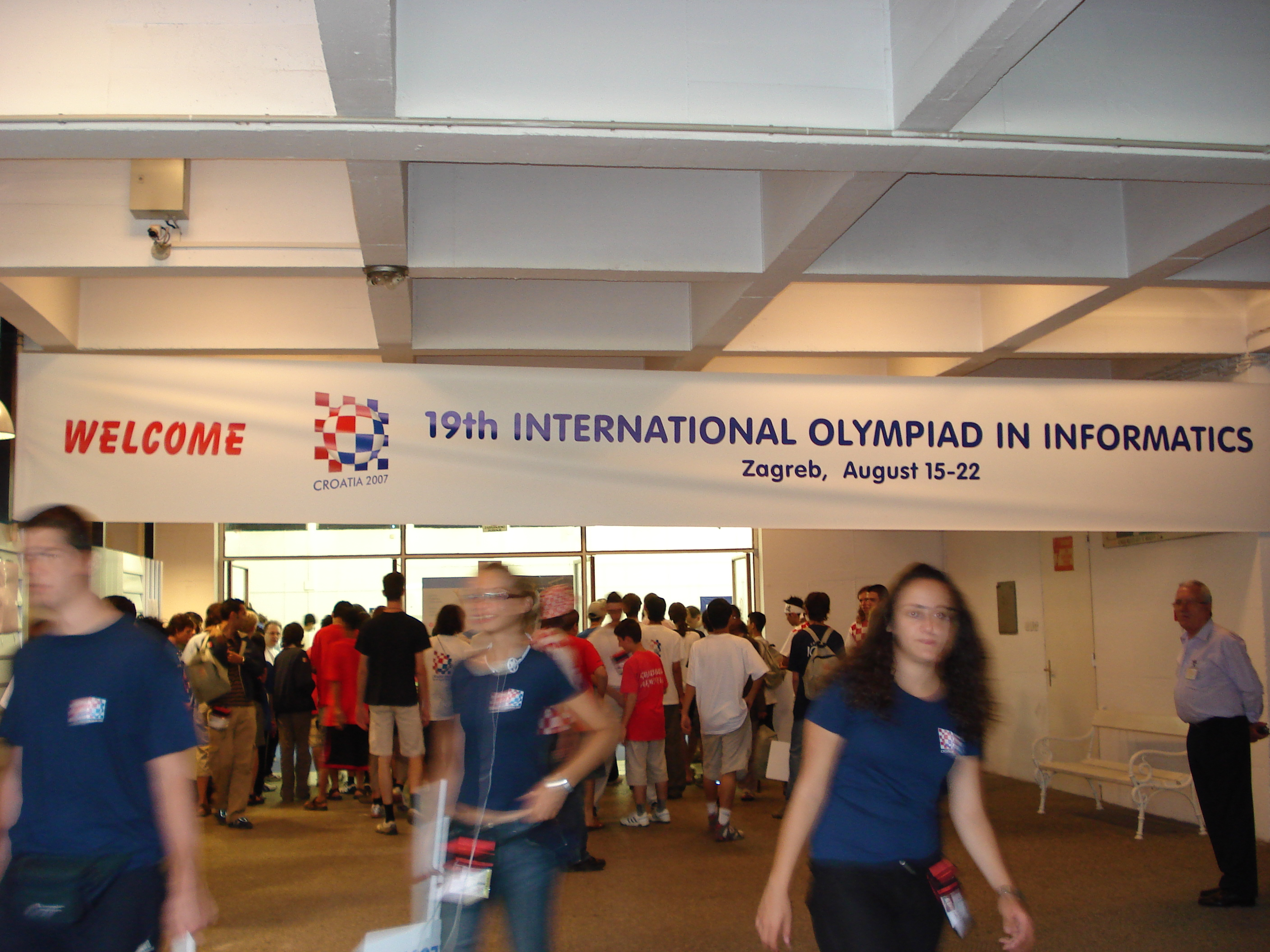 19th IOI, Zagrebački Velesajam, Zagreb, Croatia